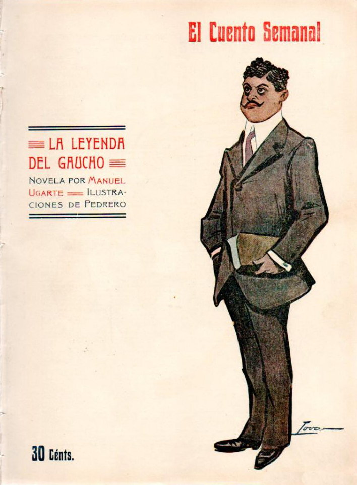 Portada de Luna lunera.